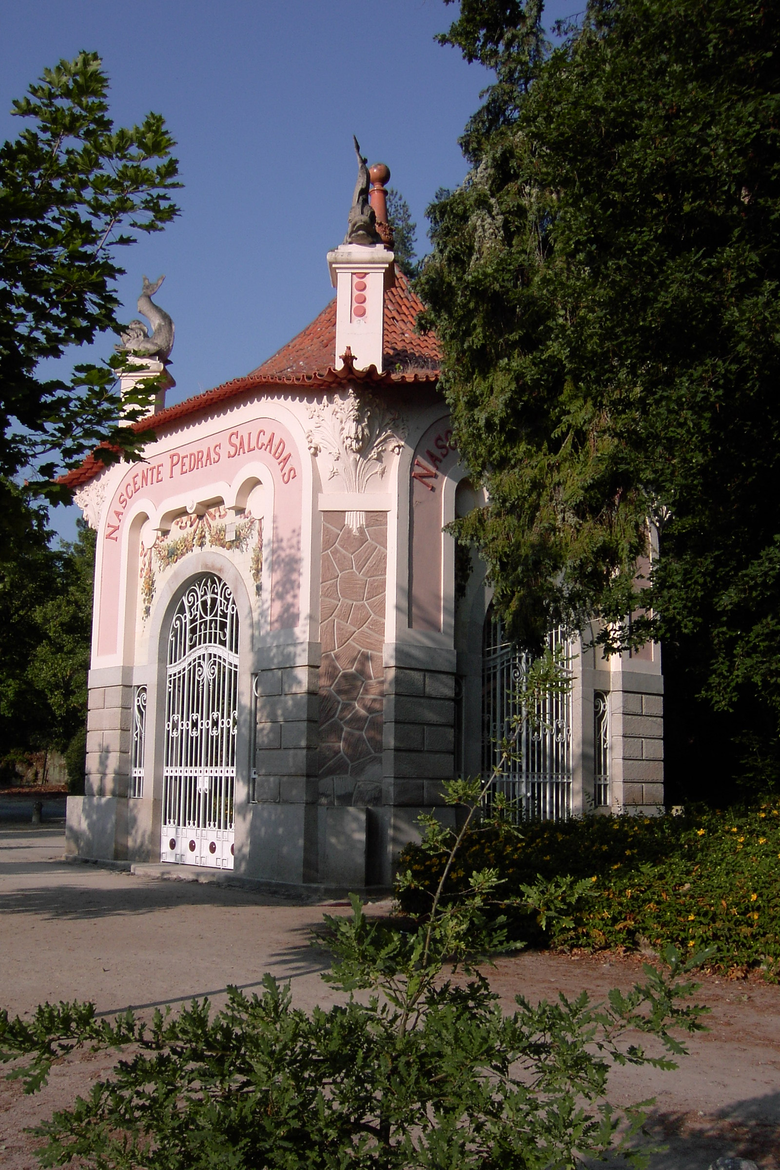 Nascente Pedras Salgadas AUTOR: Maricelper LOCAL: Parque Termal Pedras Salgadas, Vila Pouca de Aguiar DATA: 06/2005 ORIGEM: Arquivo pessoal